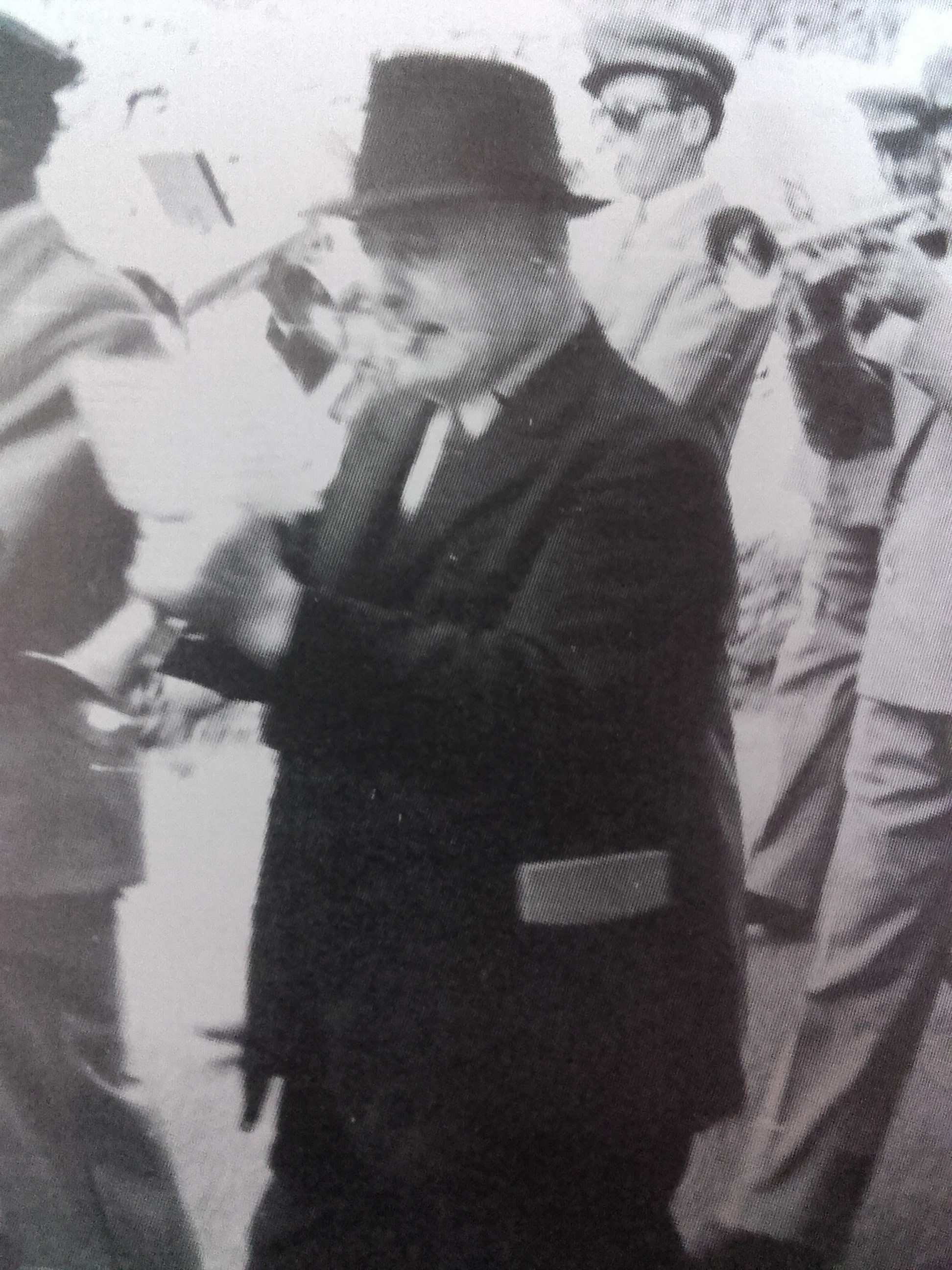 Quirino Besati